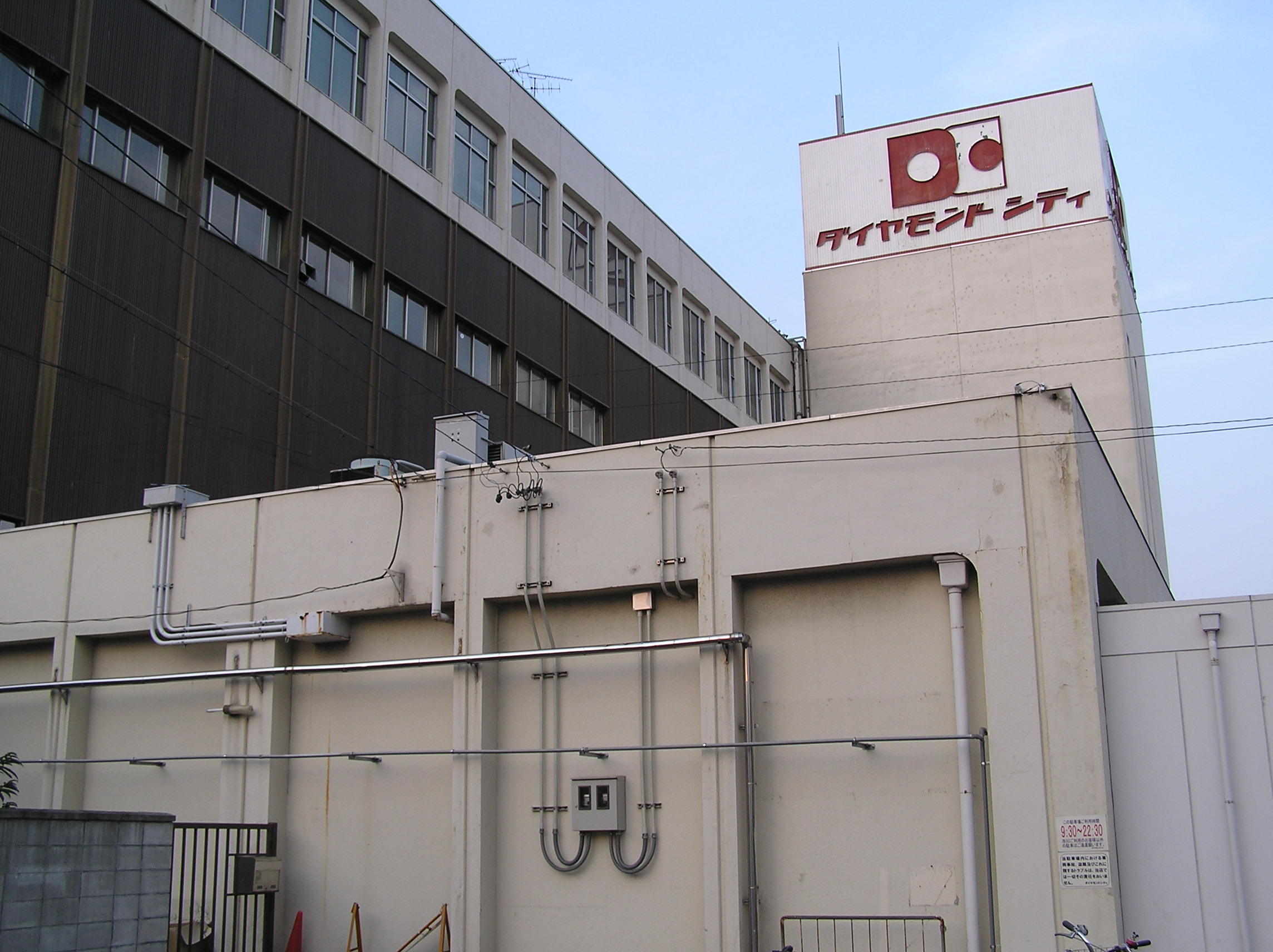 名古屋市西区にあったダイヤモンドシティ名西ショッピングセンターを西側より写したもの。